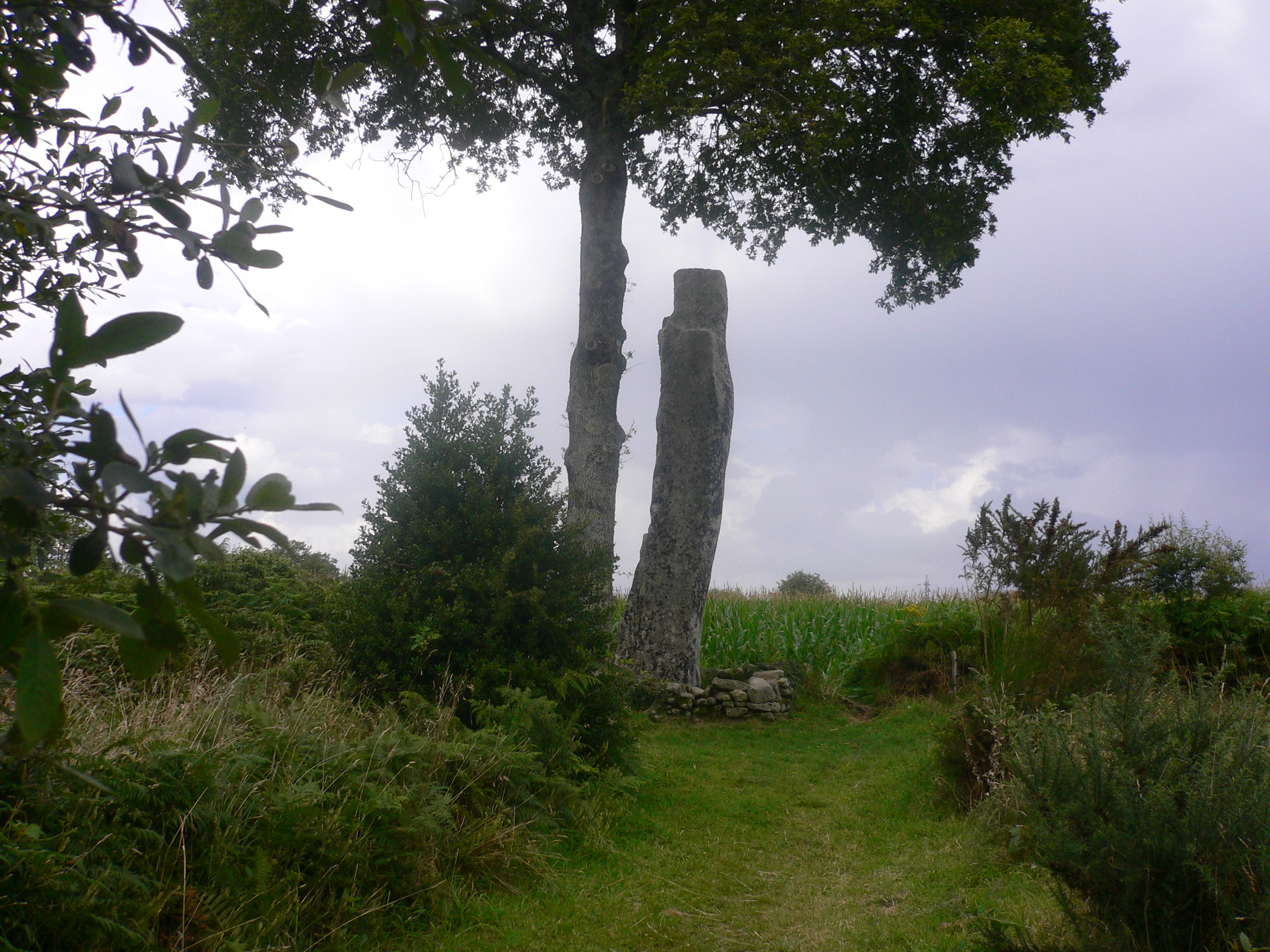 menhir Saint Jean, haut de 7 mètres